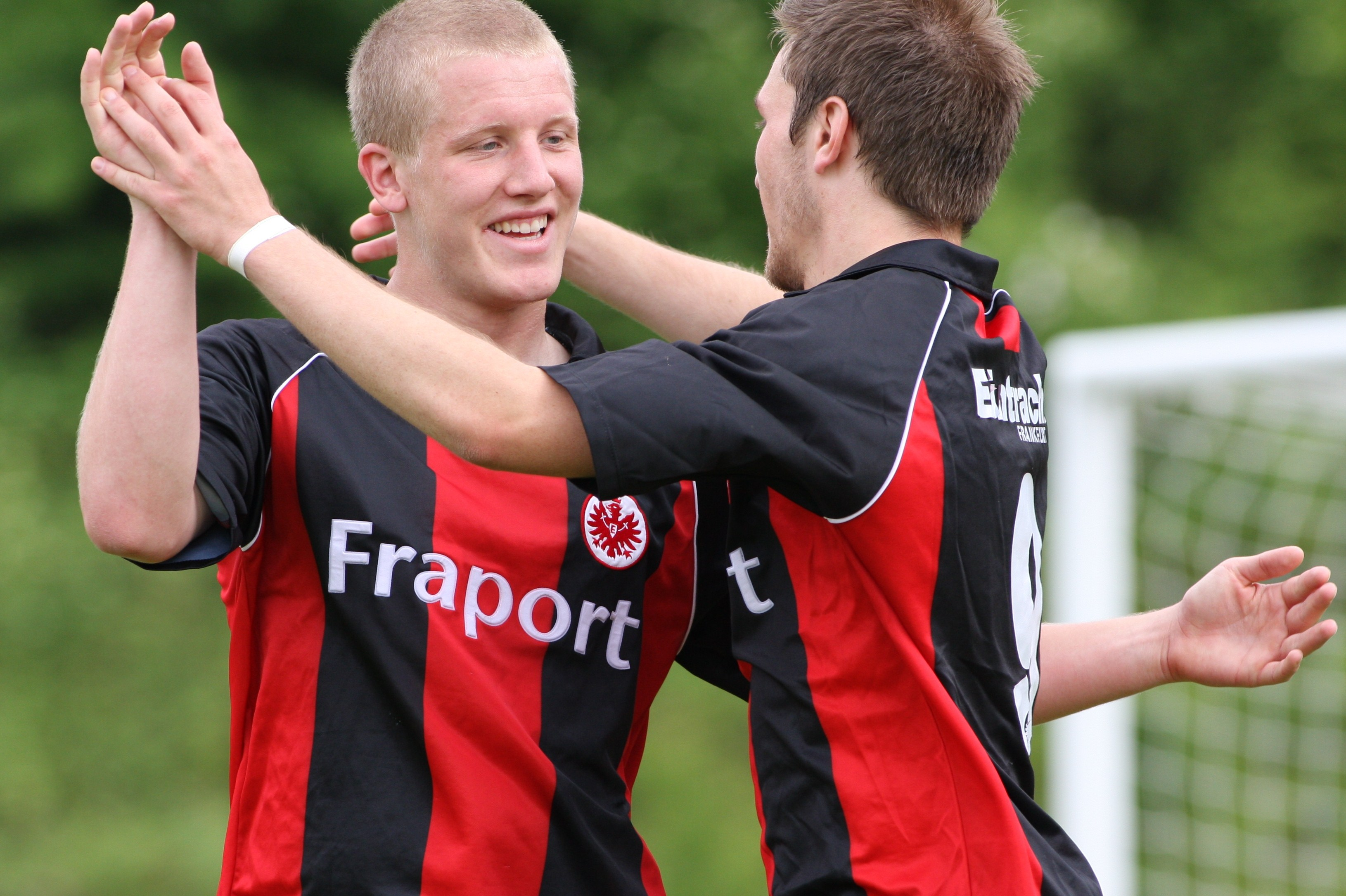 Eintracht Frankfurts Richard Weil 2008 mit Danny Galm (rechts)